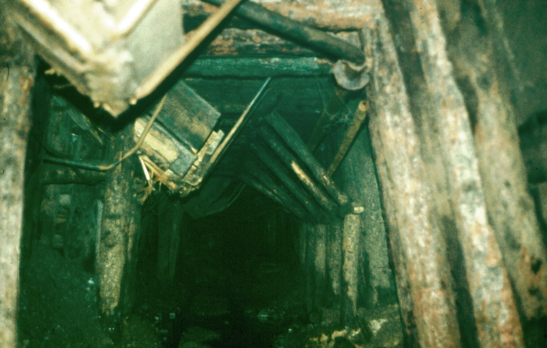 Wolframitbergwerk Burenzogt, Förderstrecke untertage